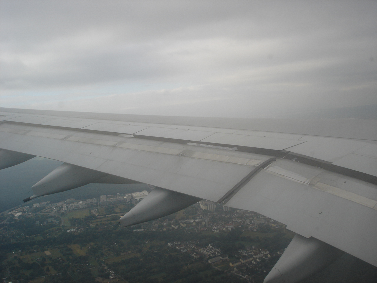 Flaps de un Airbus 340